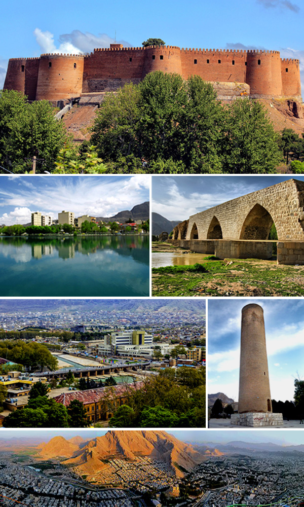 خرم آباد